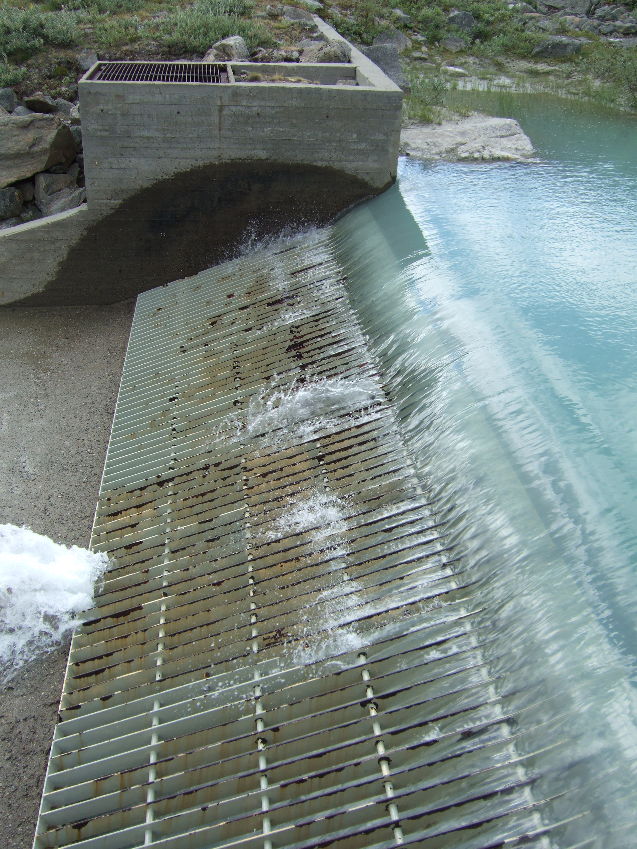 Bekkeinntak for elva Sealggajohka i Narvikfjellene i Narvik kommune i Nordland fylke. Her inntaket ovenfra og en ser varegrinden som sørger for at kvister etc. ikke skal komme inn i tunnelen.